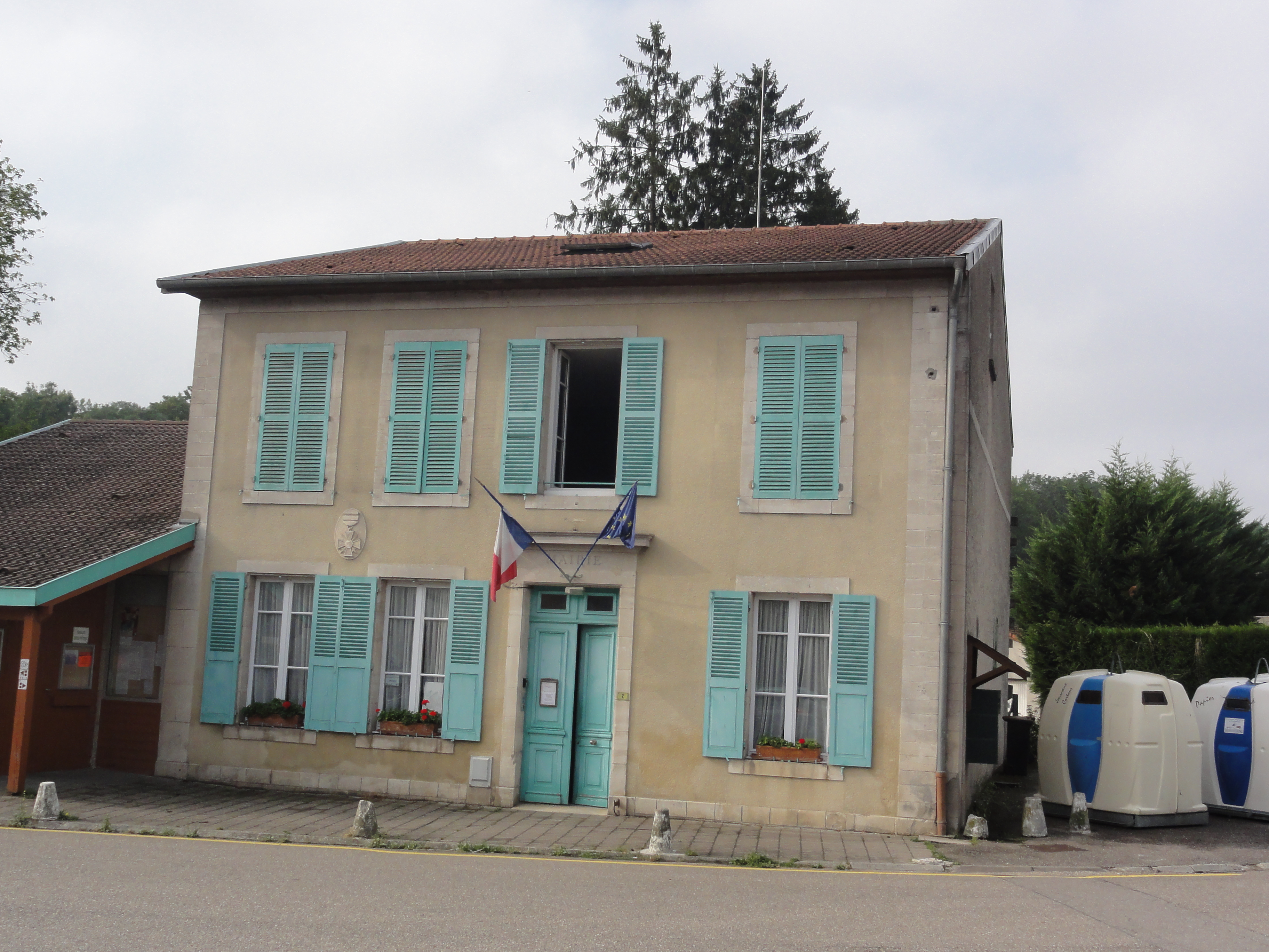 Belrupt-en-Verdunois (Meuse) mairie